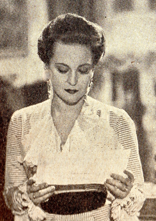 Zita Kabátová ve filmu "Muži nestárnou"